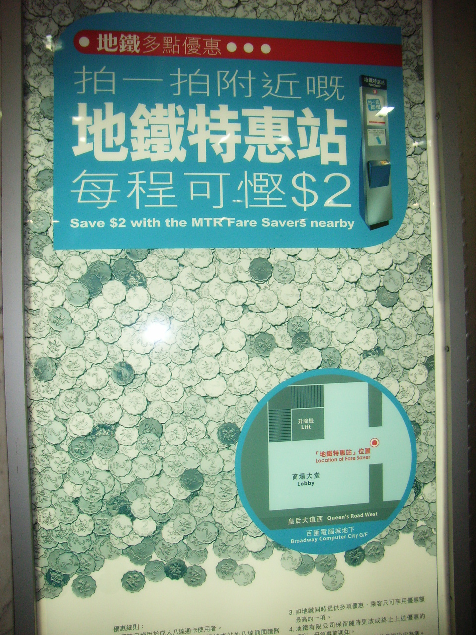 遇有地鐵特惠站，用八達通拍一拍，即日乘地鐵過海可平宣2元 DM579